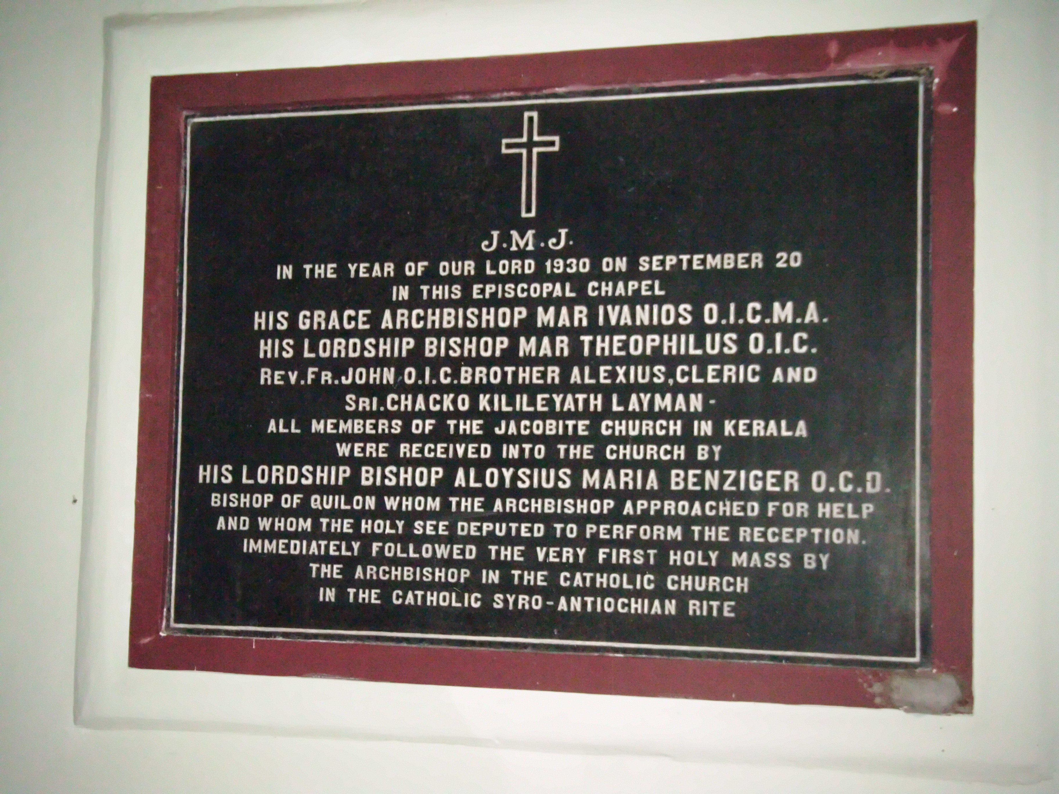 Kollam, Kerala, Indien, Bischofskapelle, Gedenkstein zur Erinnerung an die Gründung des syro-malankarischen Ritus, 1930